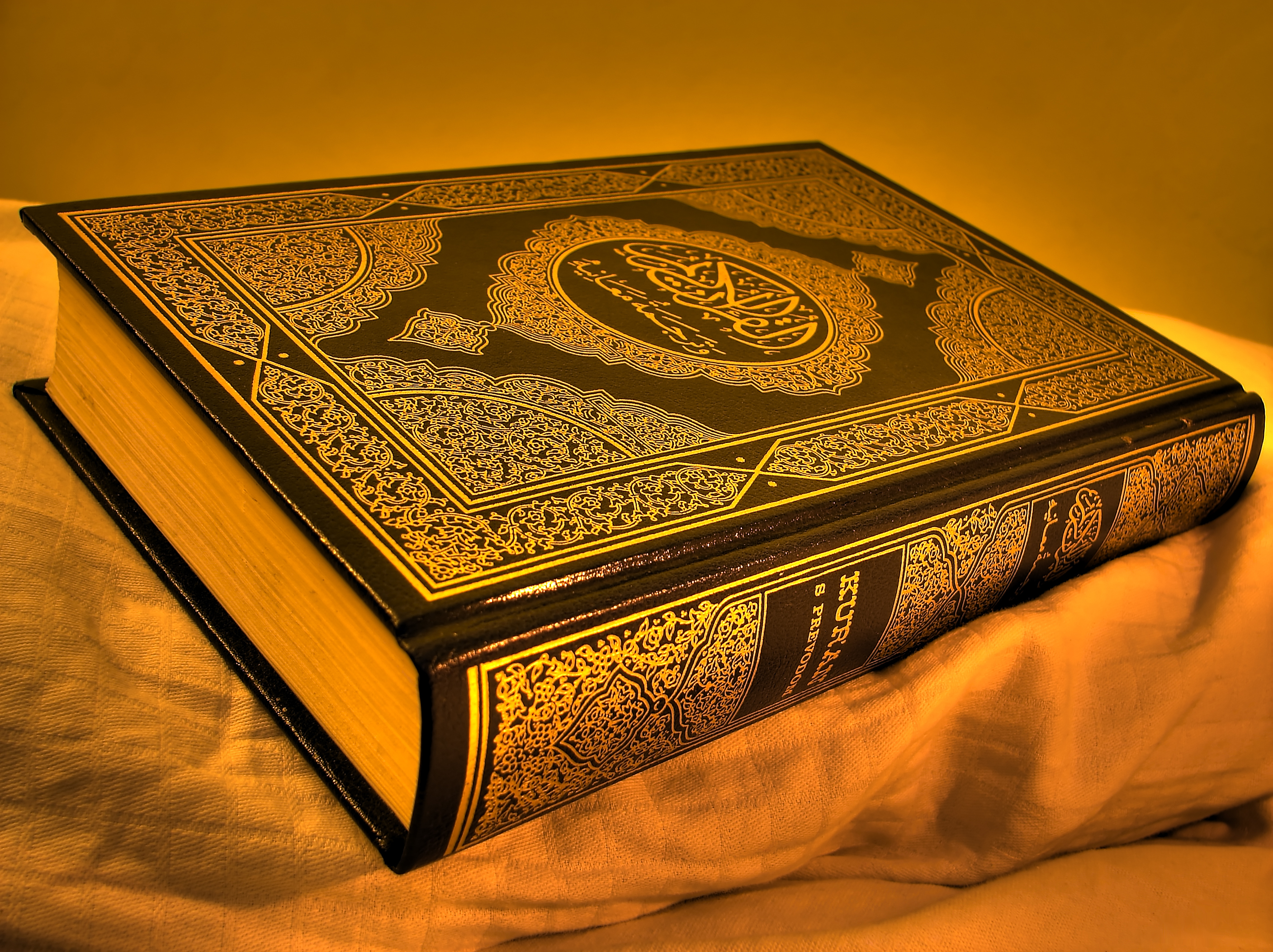 Kur'an - sveta knjiga